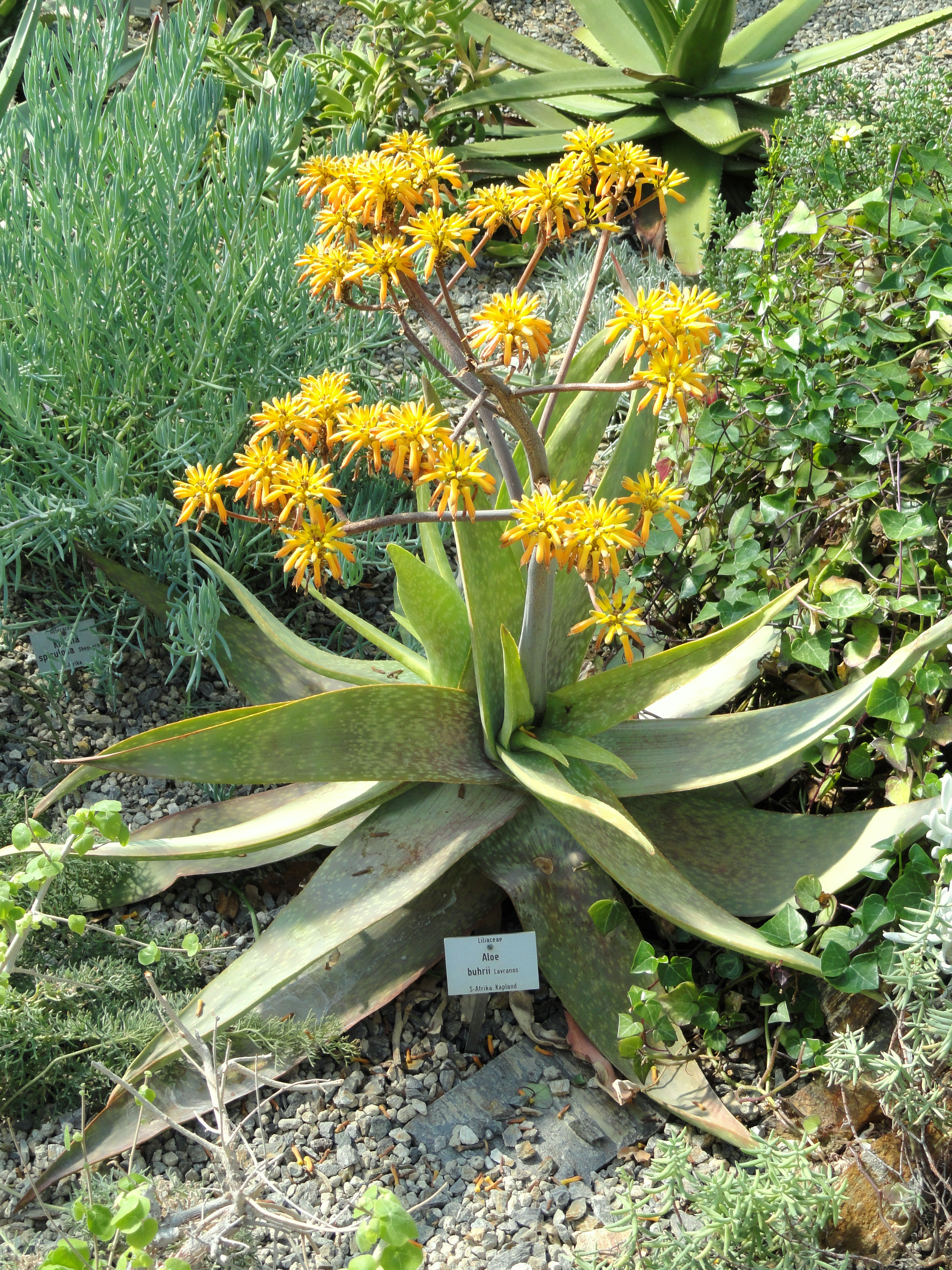 Aloe buhrii specimen in the Botanischer Garten München-Nymphenburg, Munich, Germany.